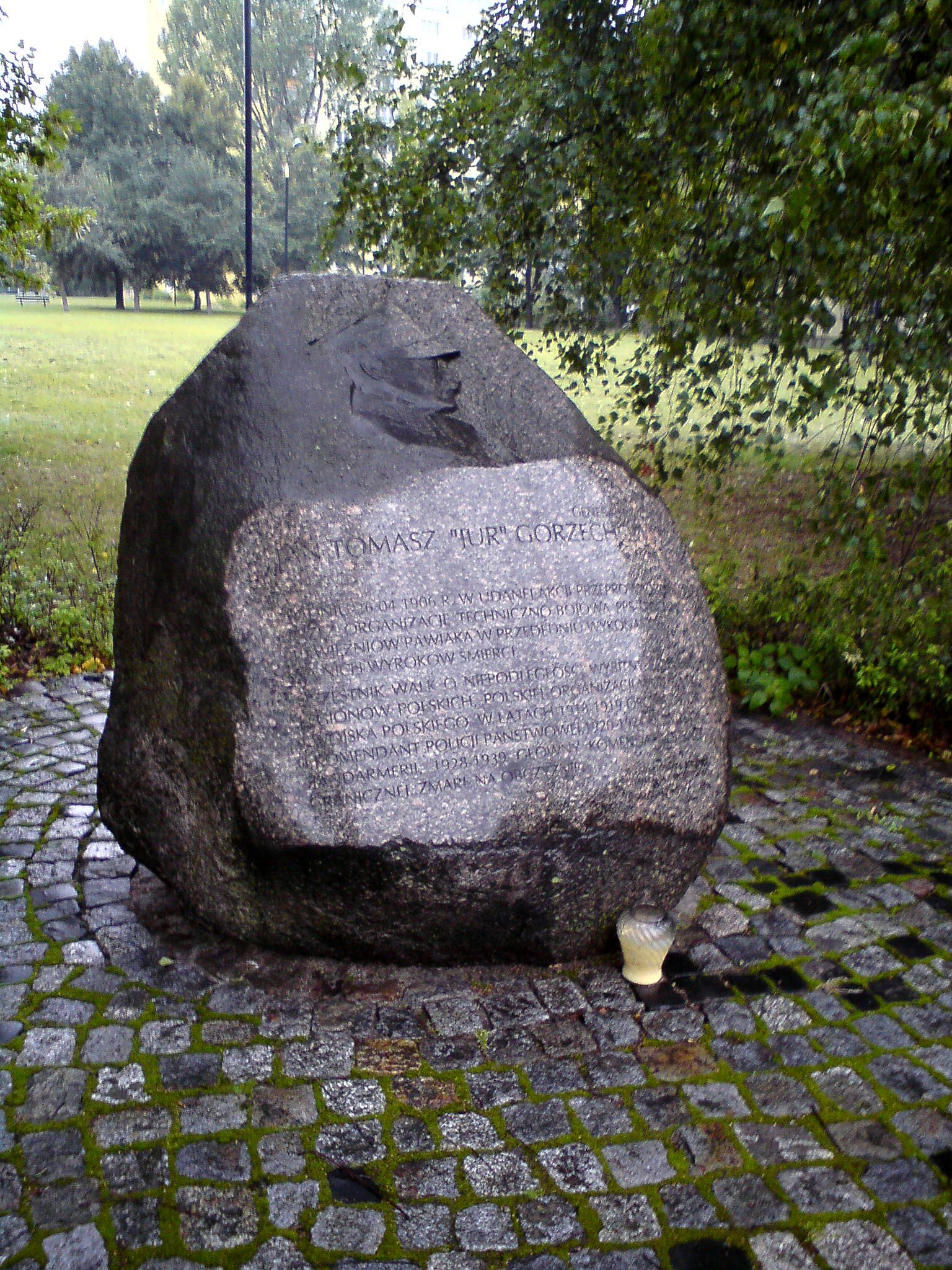 Jan Jur-Gorzechowski - obelisk róg Dzielnej i Al. Jana Pawła II w Warszawie